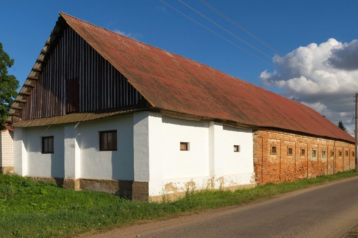 Удзела. Замалёўкі